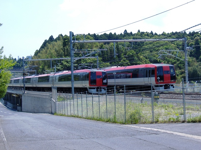 堀ノ内信号場